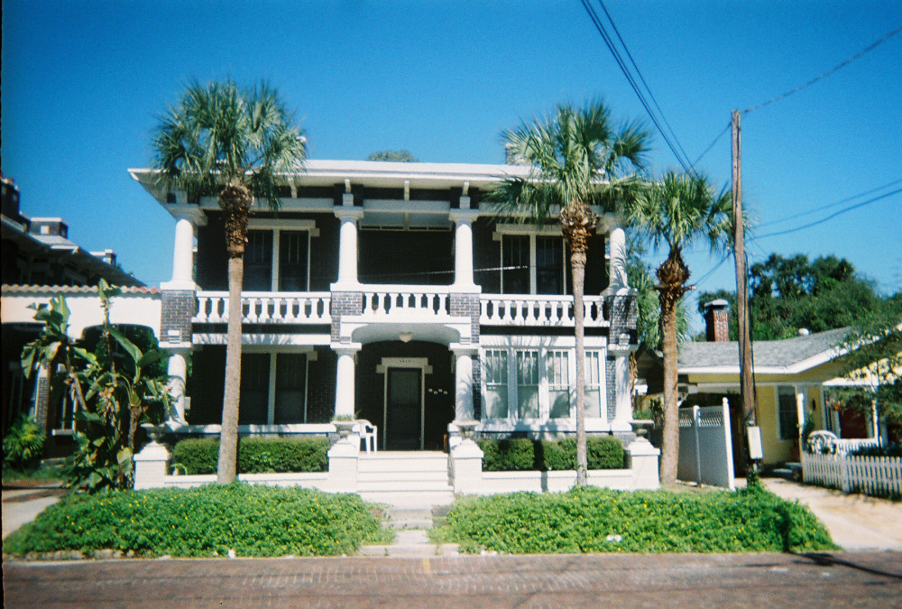 LeClaire Apartments, in Tampa, Florida